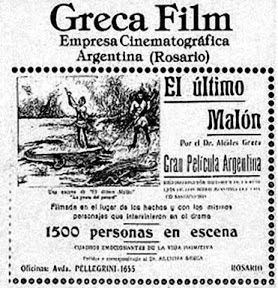 Poster de El último malón